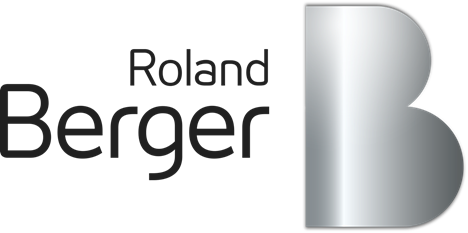 RolandBerger logo 2017